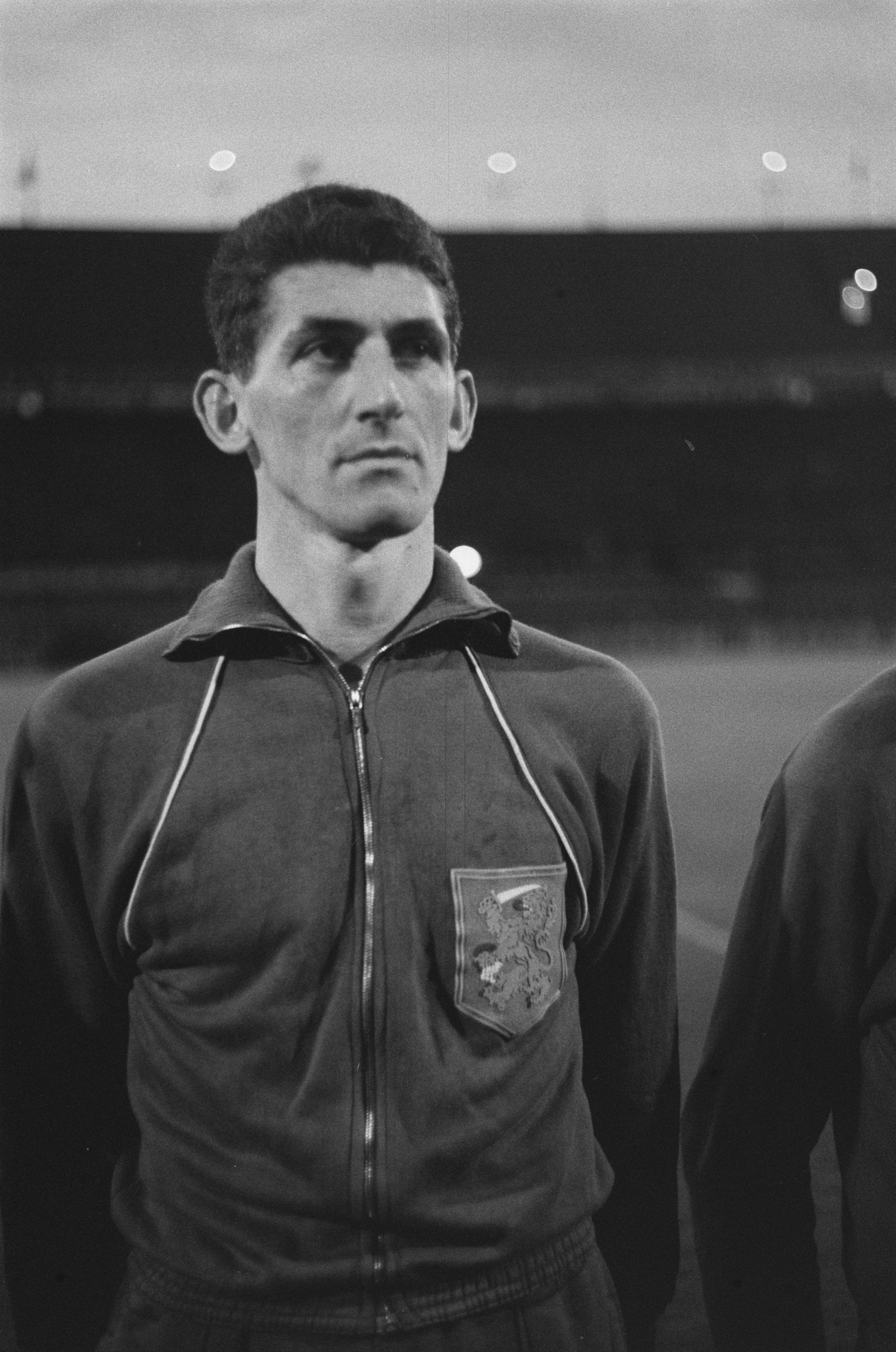 Collectie / Archief : Fotocollectie Anefo Reportage / Serie : [ onbekend ] Beschrijving : Nederland tegen Zweden 0-1, nr. 3 en 4 Haenen (kop) Datum : 29 april 1964 Locatie : Nederland, Zweden Trefwoorden : sport, voetbal Persoonsnaam : Haenen Fotograaf : Pot, Harry / Anefo Auteursrechthebbende : Nationaal Archief Materiaalsoort : Negatief (zwart/wit) Nummer archiefinventaris : bekijk toegang 2.24.01.05 Bestanddeelnummer : 916-3649